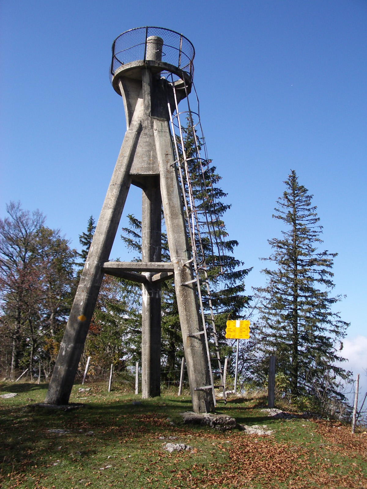 Mont Raimeux BE/JU, Switzerland